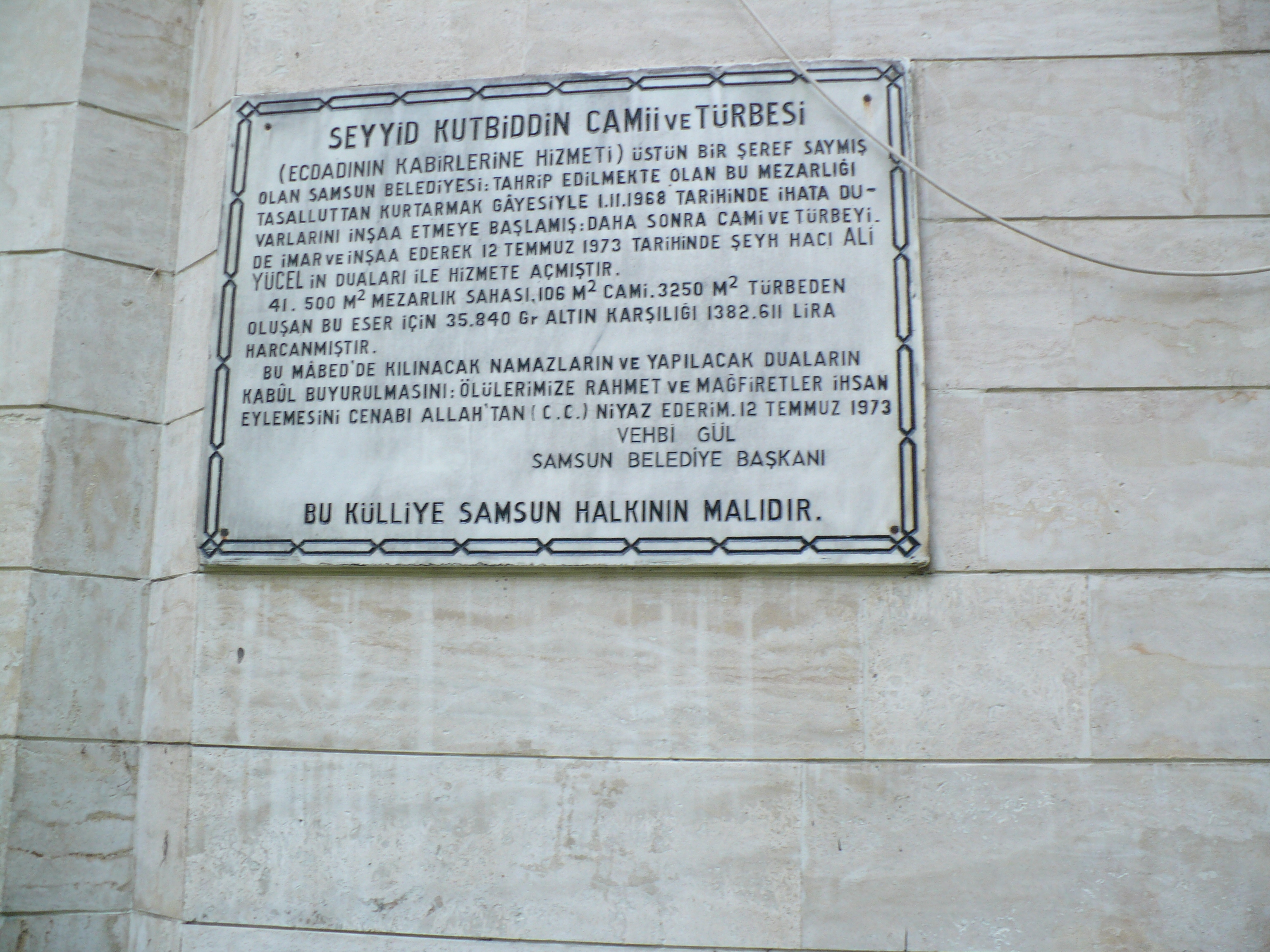 Seyyid Kutbiddin Camii ve Türbesine ilişkin mermere kazınmış bilgi tabelası (12 Temmuz 1973-Samsun)